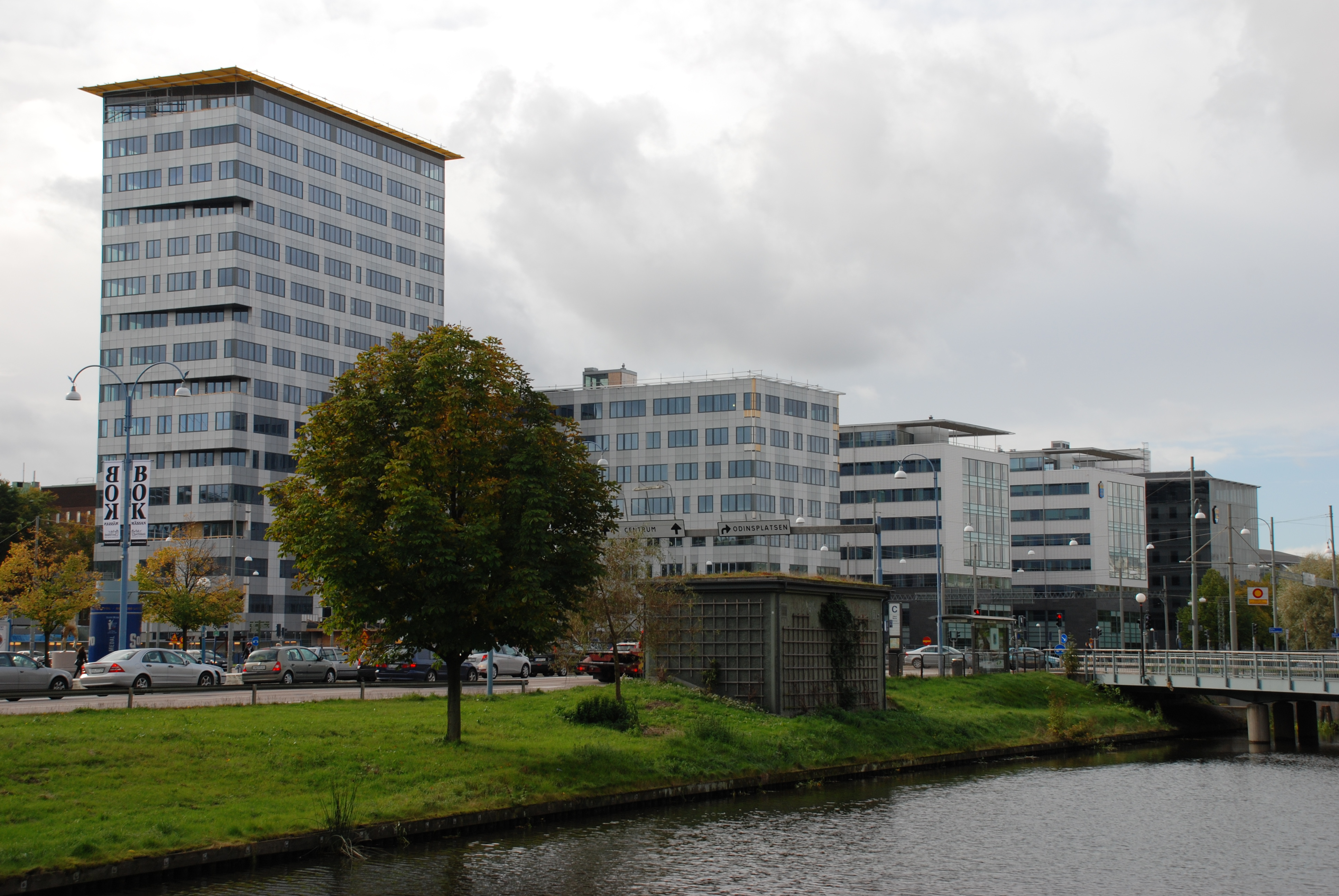 Rättscentrums nya delar med kontor, Göteborgs tingsrätt och häkte, sett från Lilla Stampgatan över Ullevigatan